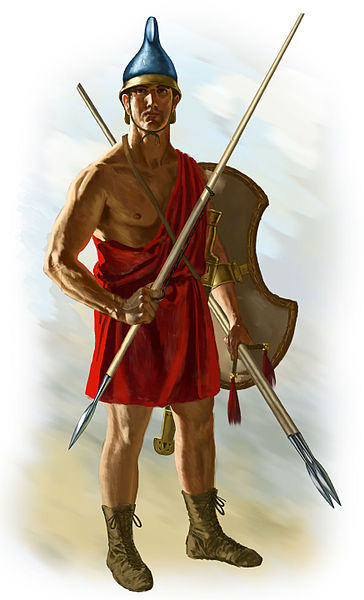 Miles expeditus.